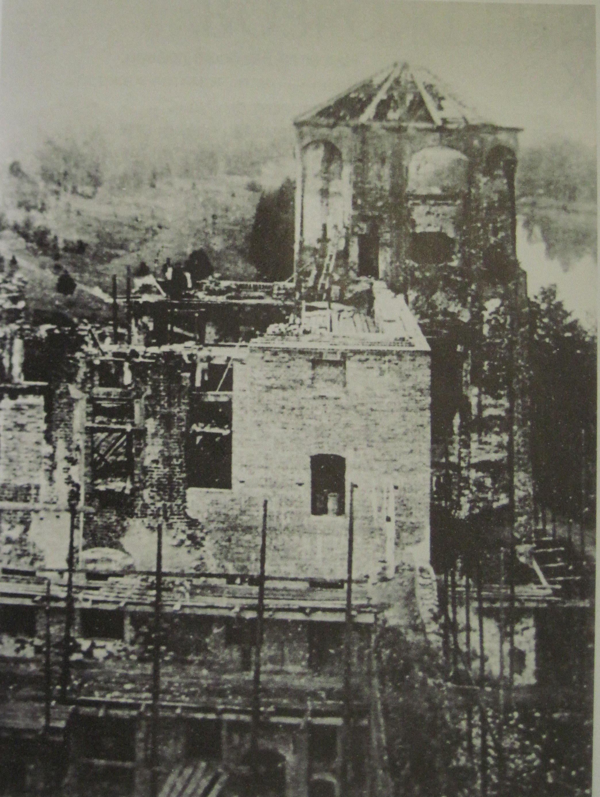 Рэканструкцыя Мірскага замка ў 1920-ыя гады. Паўднёва-заходняя вежа